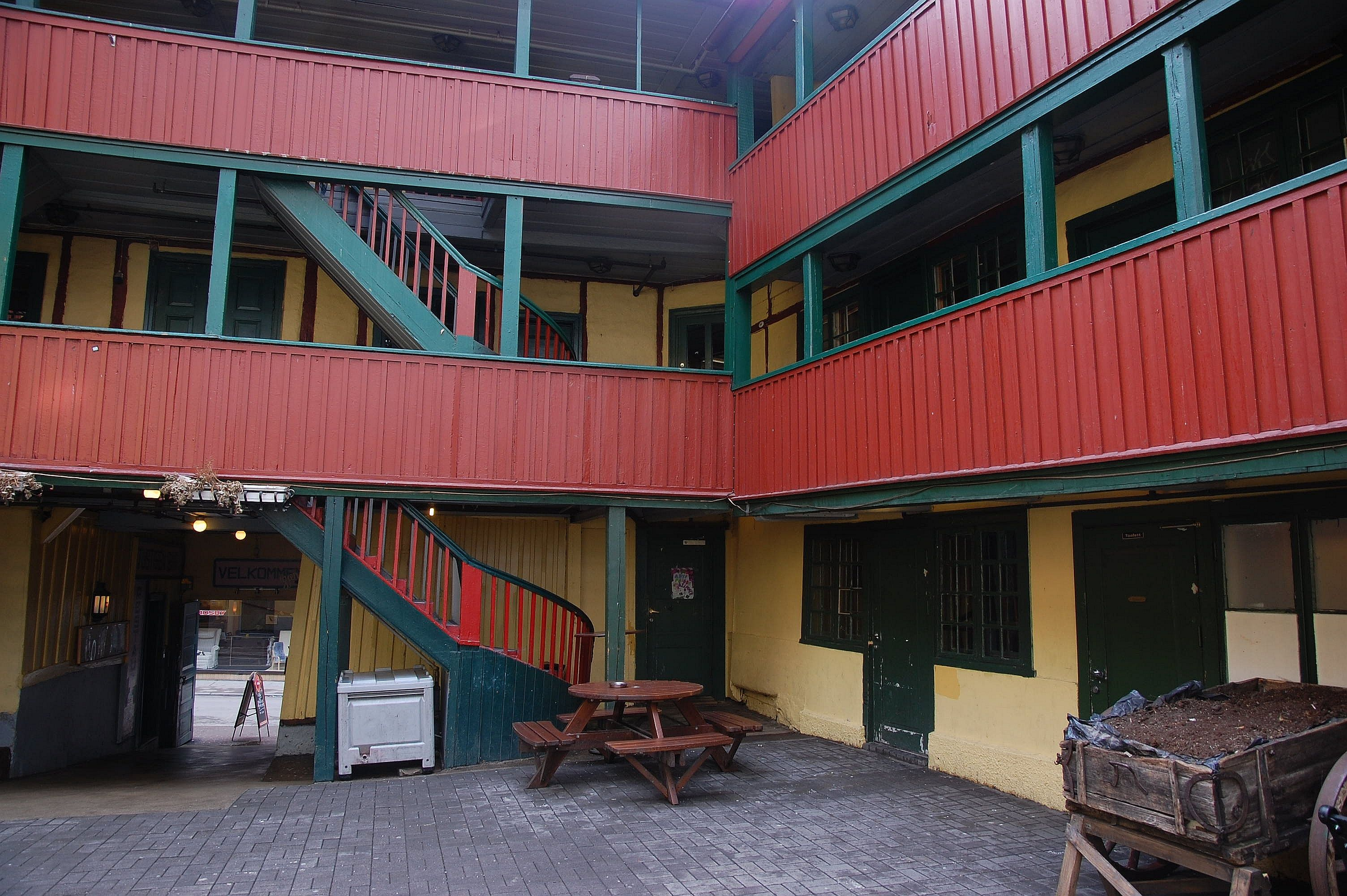 Justisen i Møllergata i Oslo